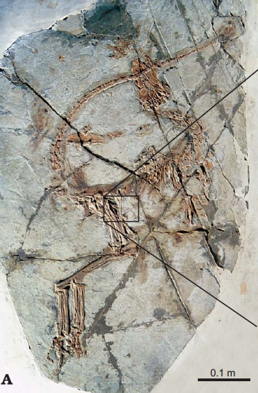 Fossile di Sinosauropteryx prima con in evidenza l'ultimo pasto costituito da 3 mammaliaformi (Zhangheotherium e Sinobaatar)